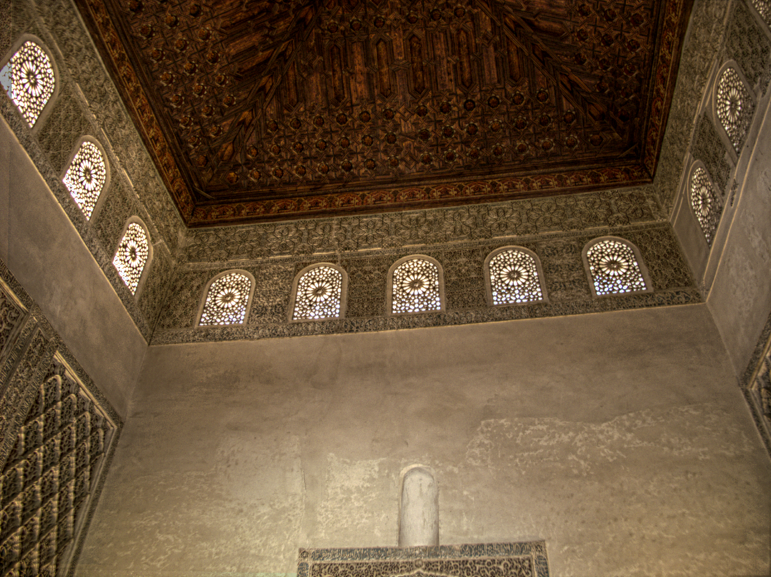 Cuarto Real de Santo Domingo Interior recientemente restaurado, con artesonado y mocárabes